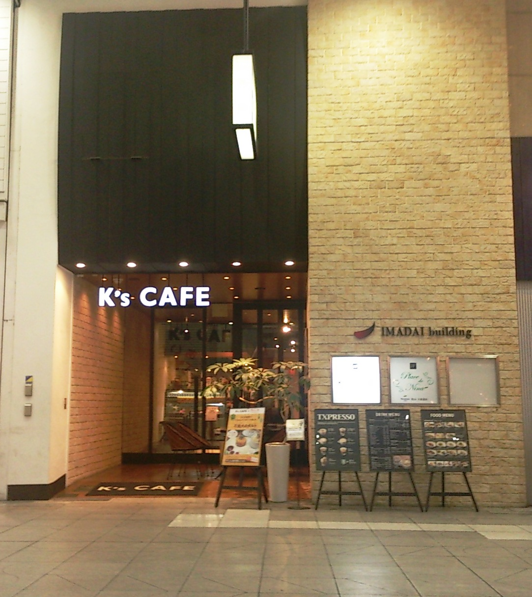 K'SCAFE松山大街道店（2015年5月31日閉店）